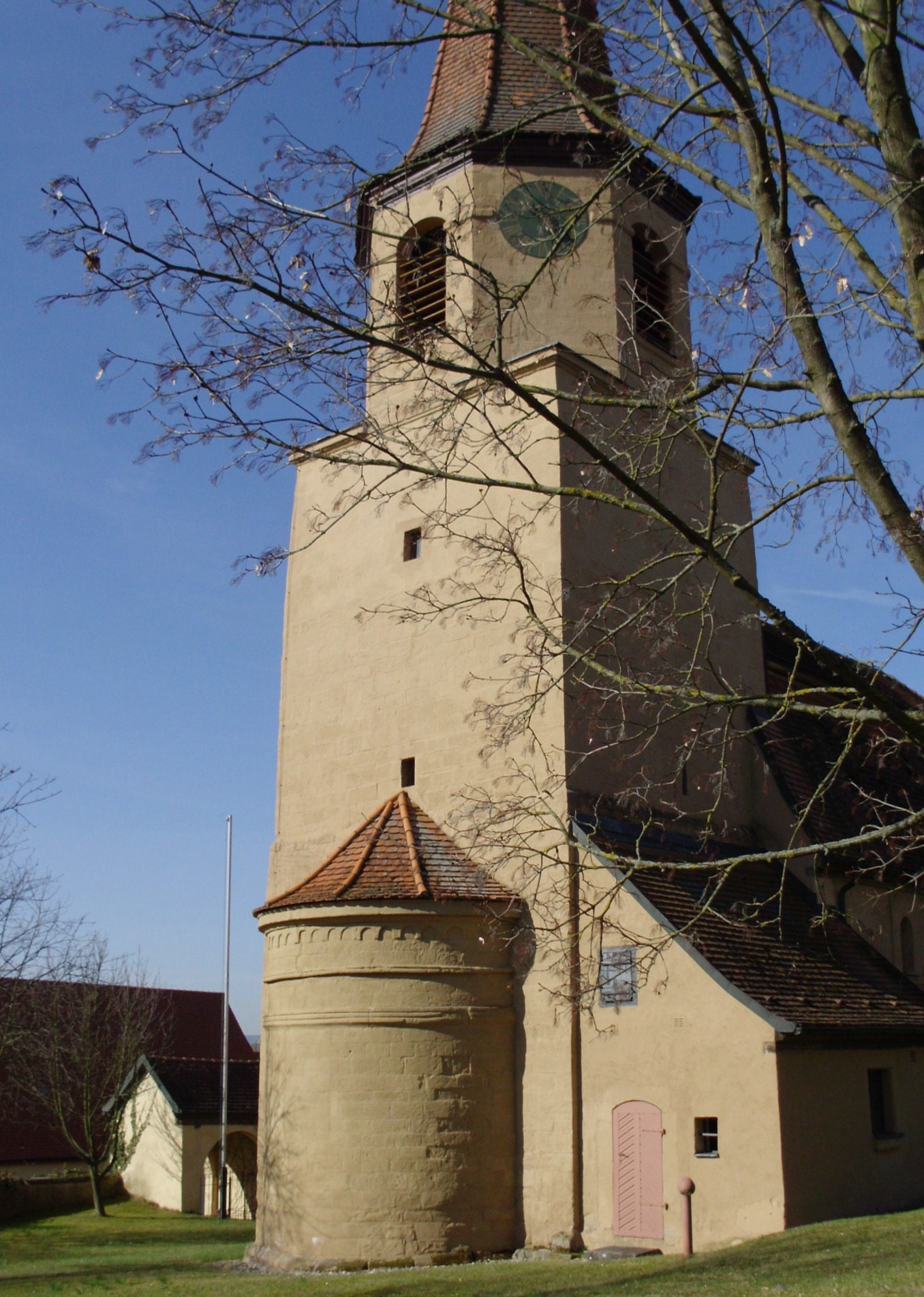 Evang.-Luth. Pfarrkirche St. Michael in Pfofeld im mittelfränkischen Landkreis Weißenburg-Gunzenhausen mit romanischer Apsis